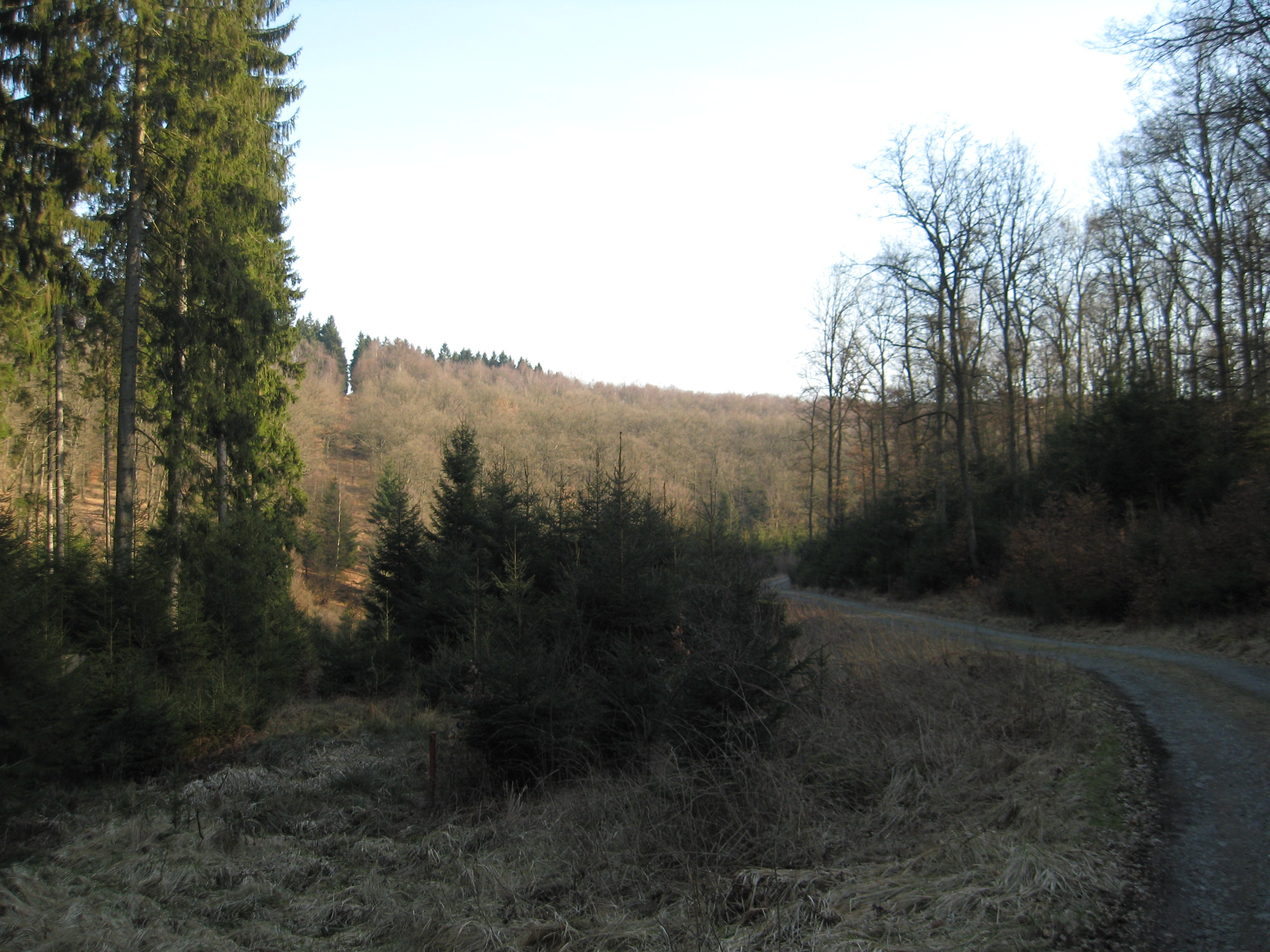 Das Gutenbachtal nordwestlich von Salchendorf, Neunkirchen im Siegerland.